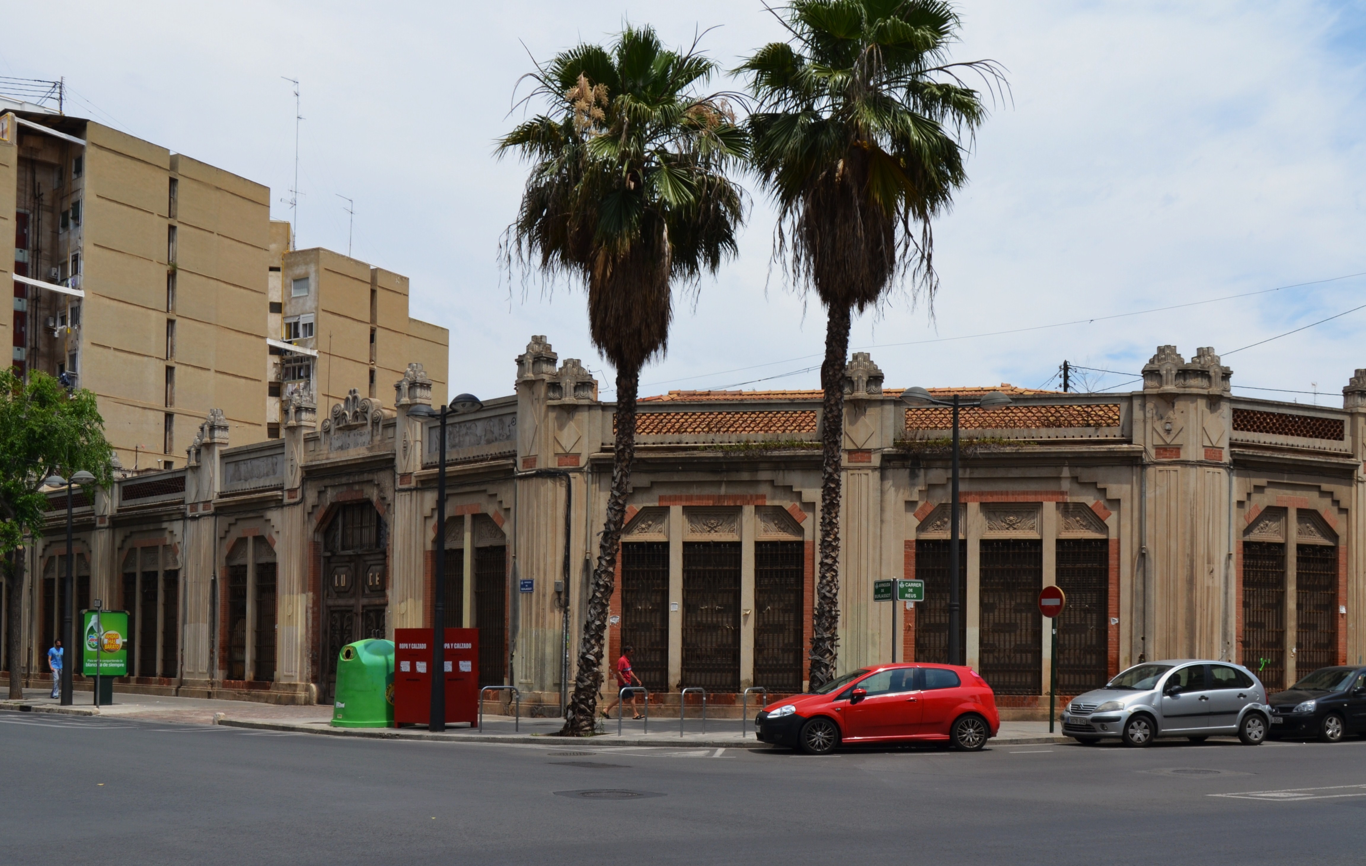 Fàbrica de Bombes Gens, avinguda de Burjassot, València.